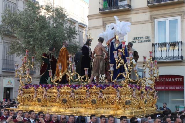 Trono de Jesús del Rescate en Plaza de la Merced (Martes Santo 2015)